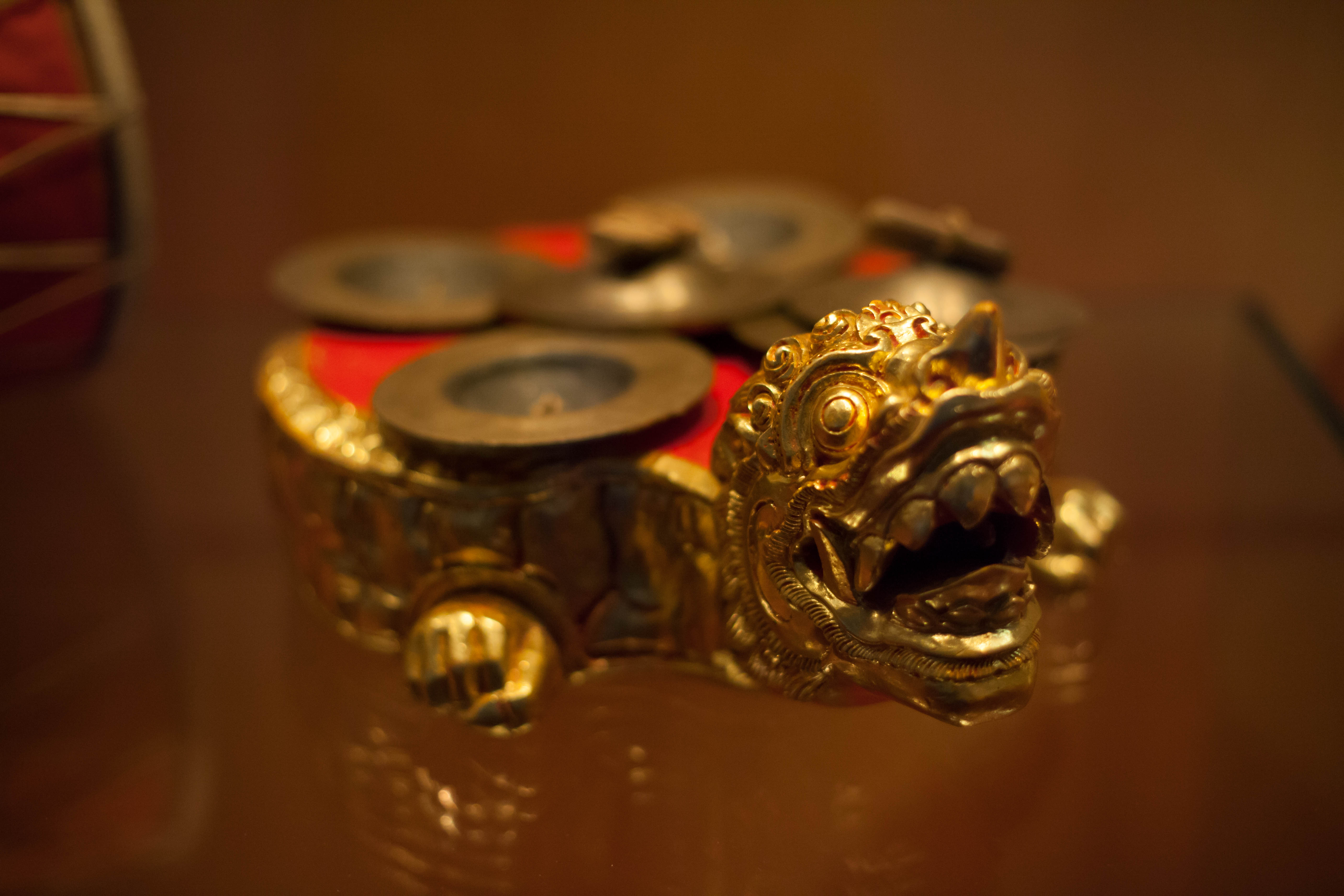 Ceng-ceng, Bali, al fons del Museu de la Música de Barcelona